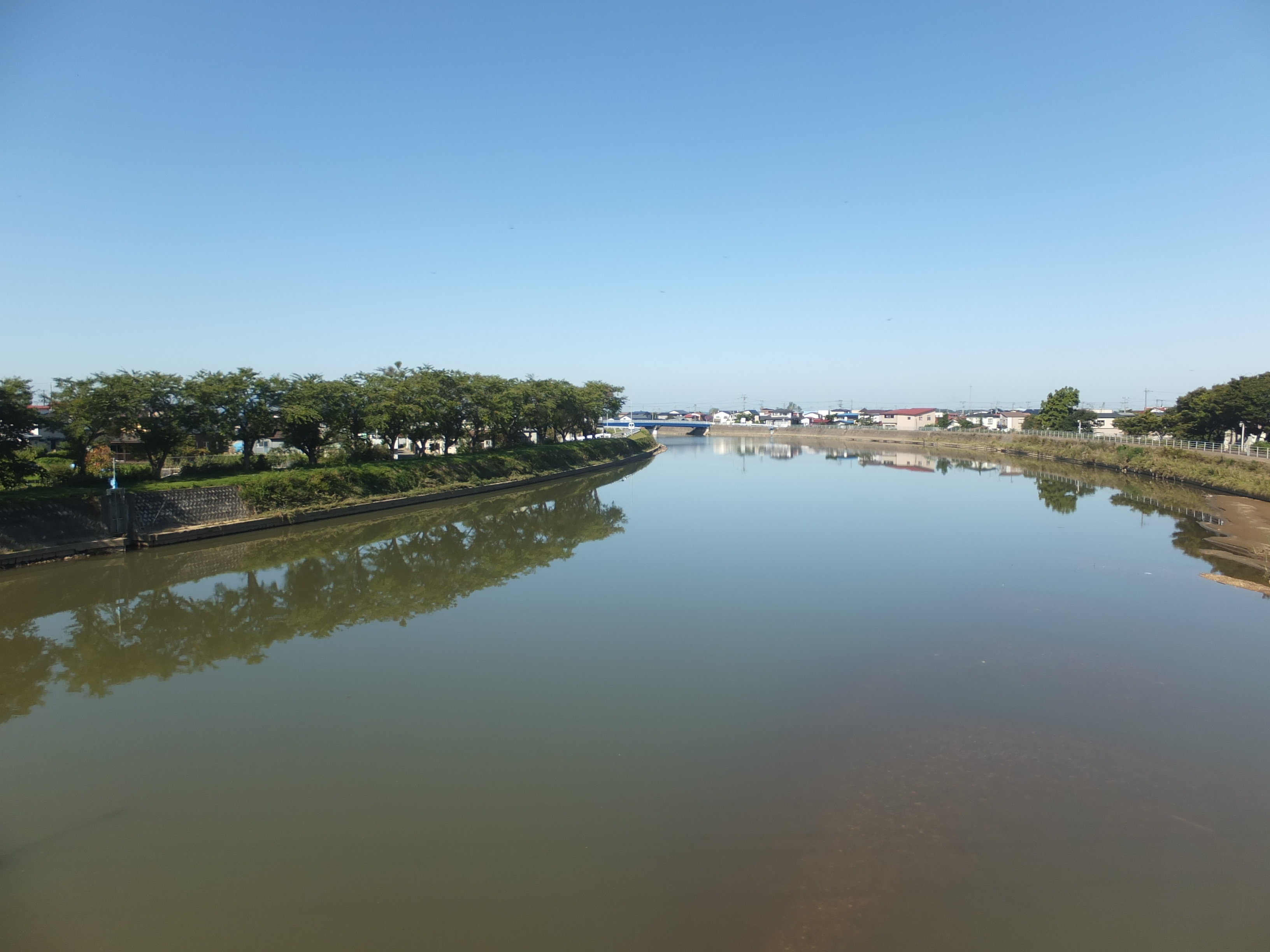 秋田県南秋田郡五城目町と八郎潟町の境を流れる馬場目川。奥羽本線車中より撮影